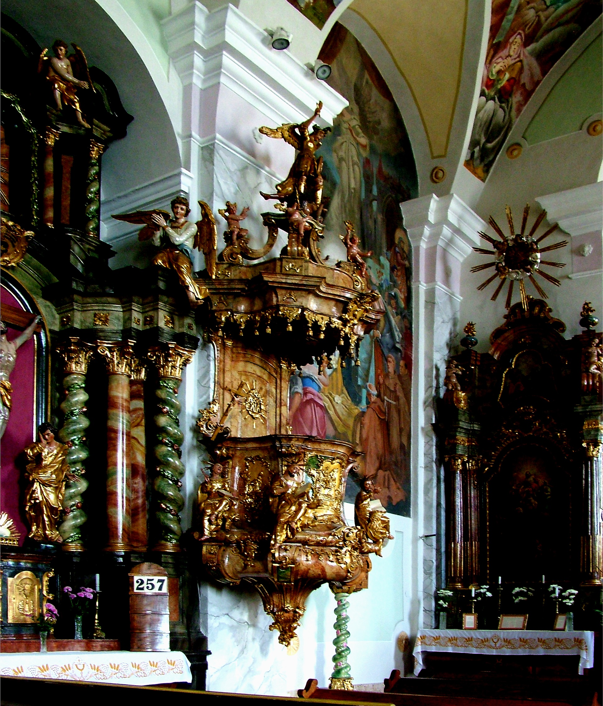 Ferences templom szószéke Sümegen